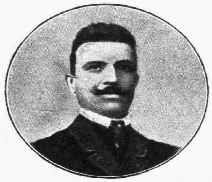 griechischer Schriftsteller, 19. Jahrhundert